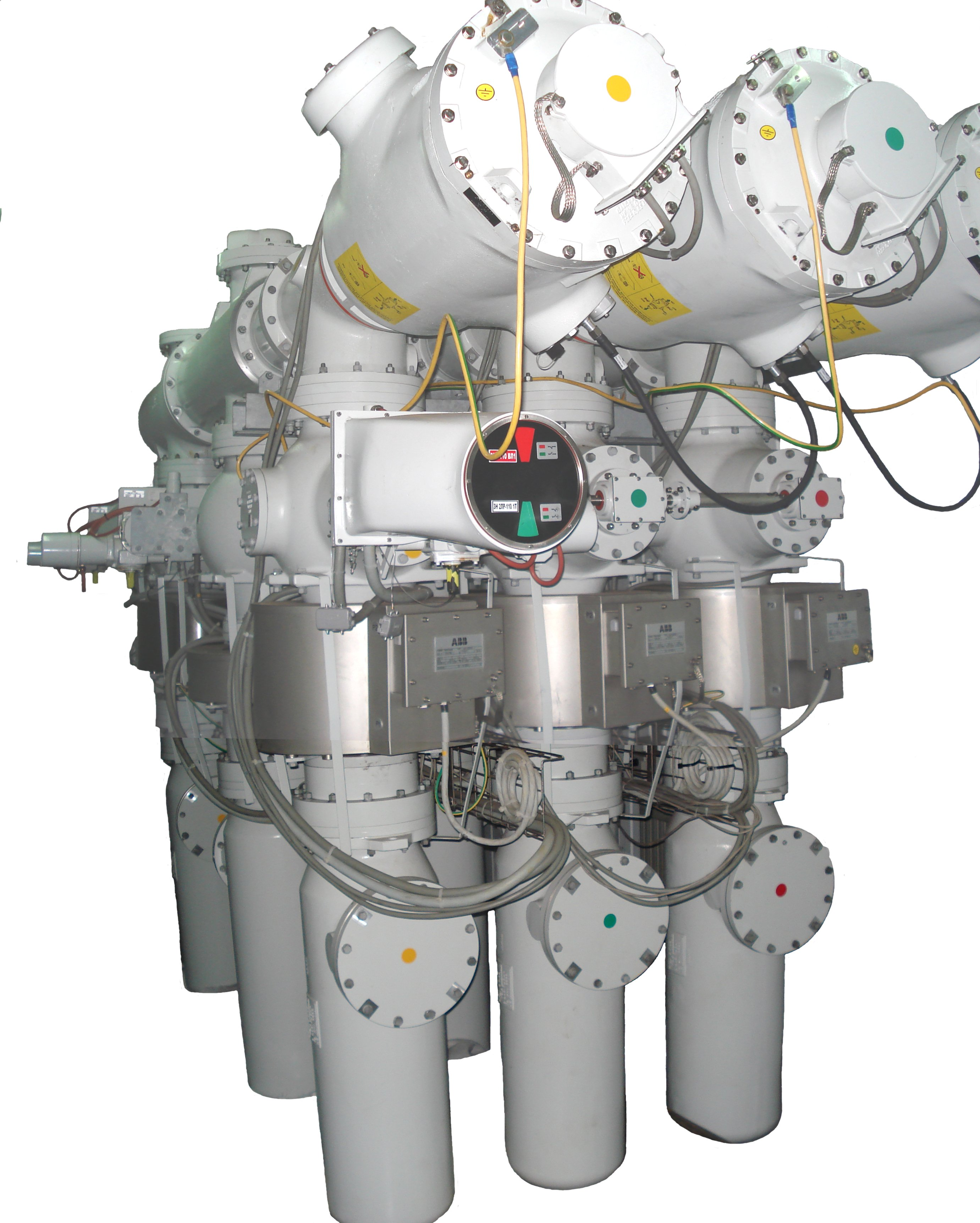 Элегазовая ячейка ABB PASS M0